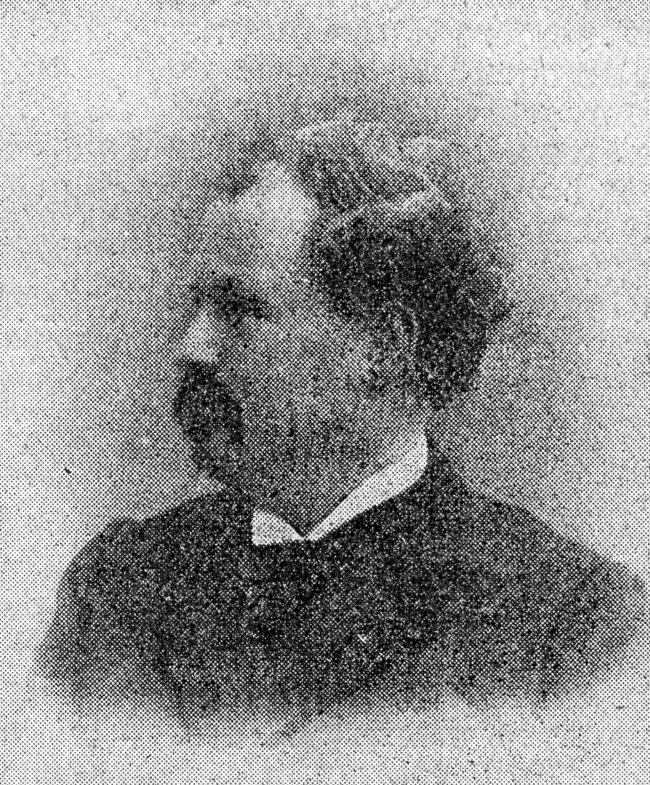 Touche à tout 1910 2eme semestre p 222 Frédéric Loliée par Henri Manuel